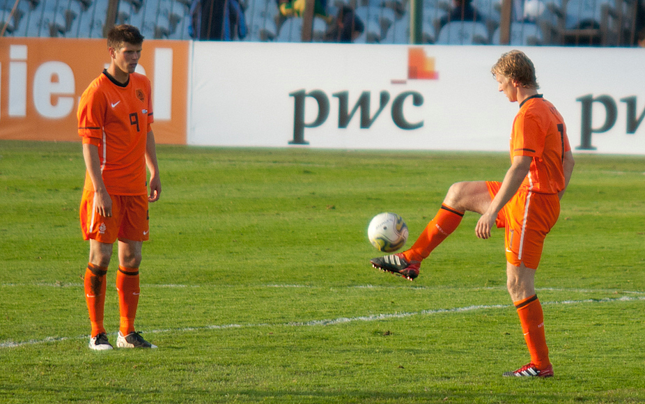 Klaas-Jan Huntelaar & Dirk Kuyt